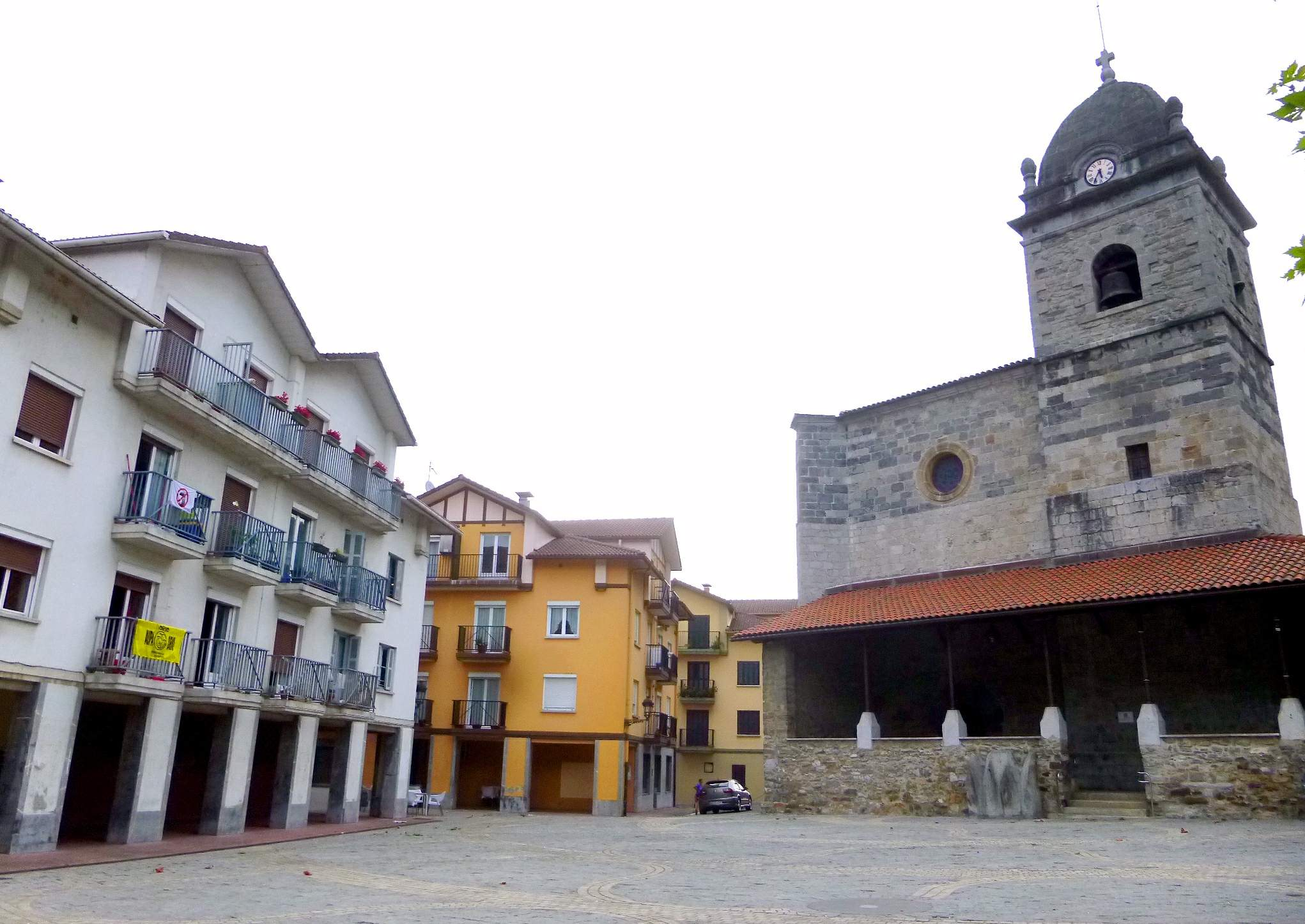 Irura (Guipúzcoa)